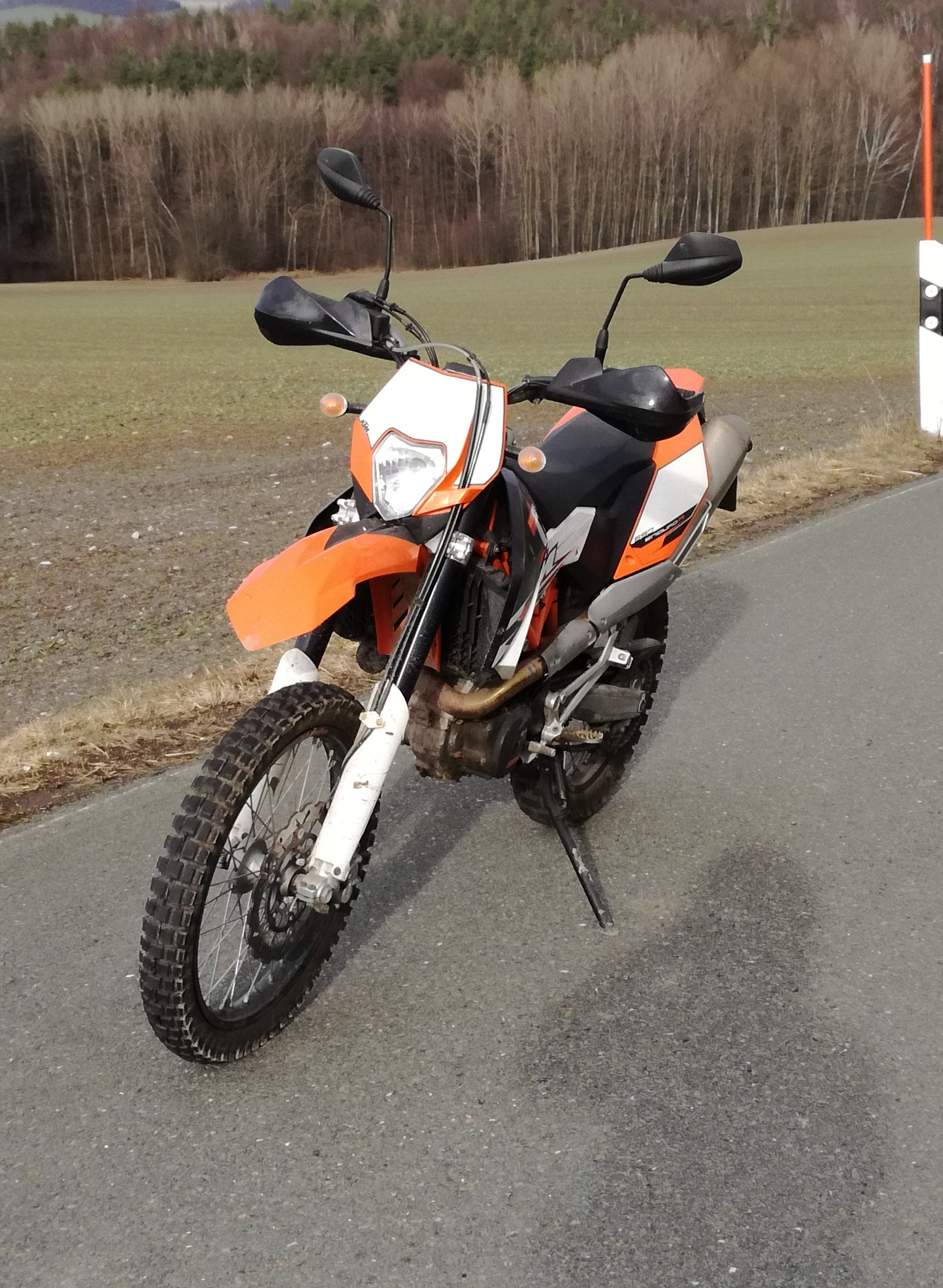 Ansicht vorn links. Ort: Weißbach Saxony